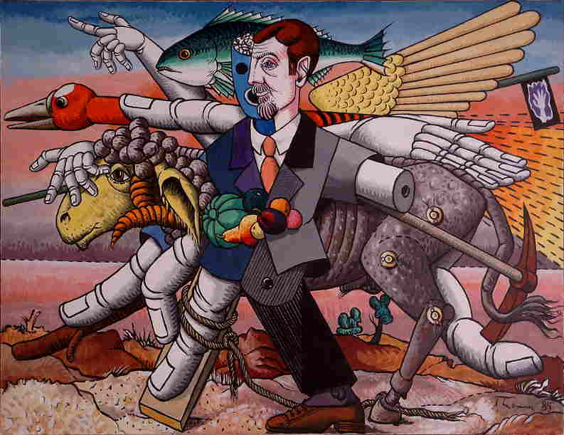 Mühevolles Weiterkommen 1985 - Aquatec auf Leinen 89 x 116,5